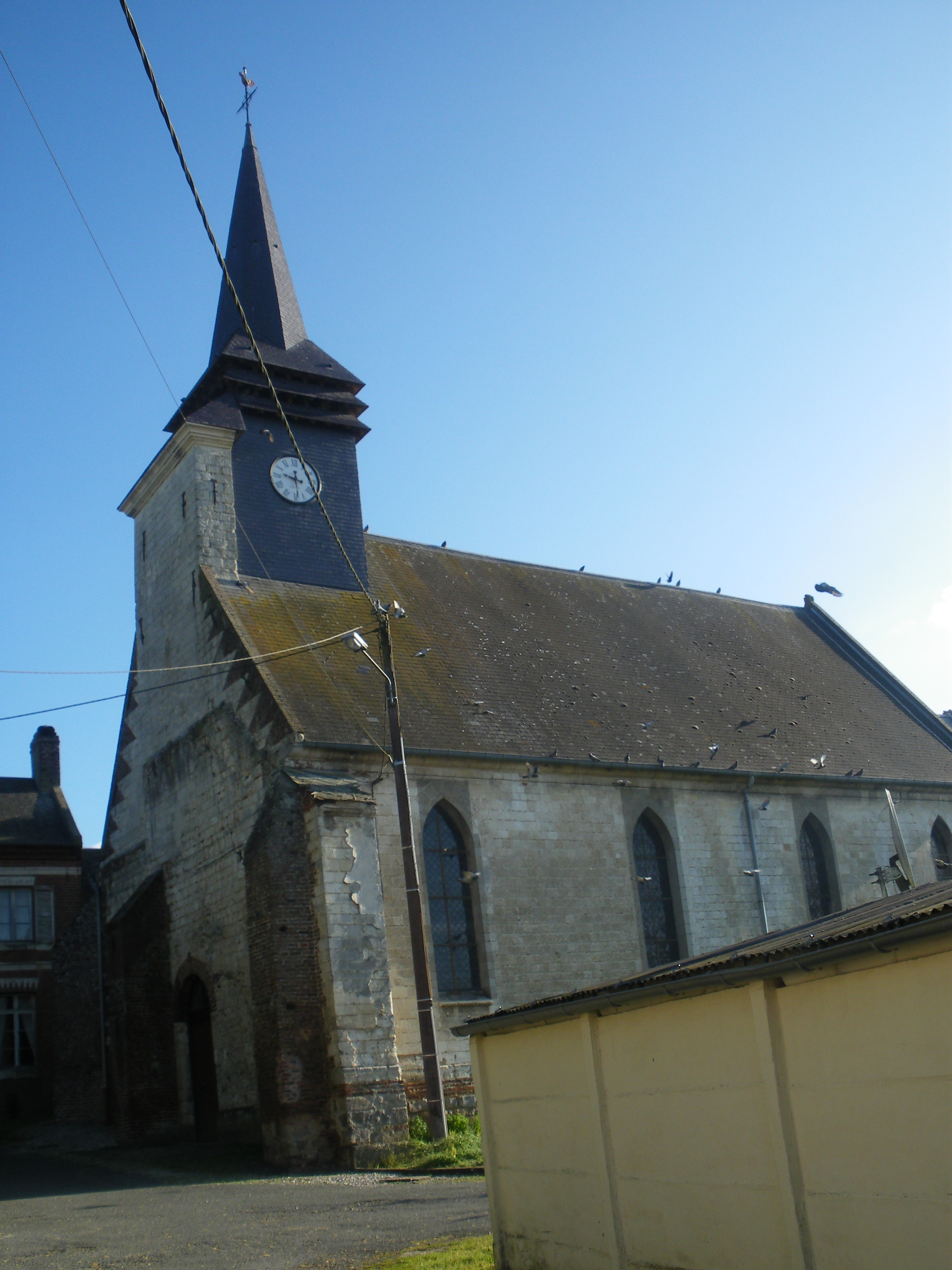 Vue de l'église Saint-Martin de la commune d'Orville, Pas-de-Calais.